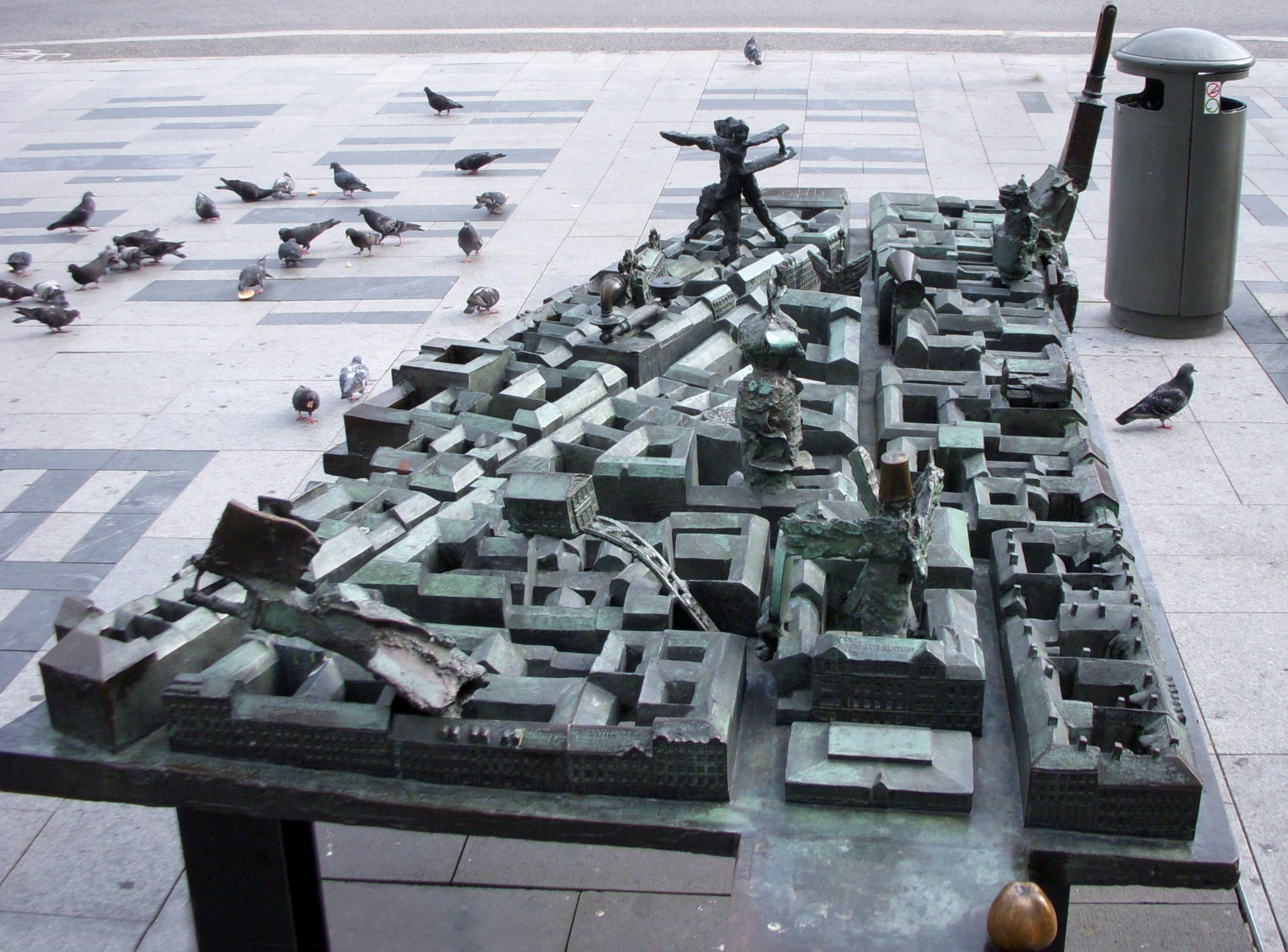 Klara är en skulptur vid norra sidan om Sergels torg i Stockholm. Skulpturen restes 1980 och är utförd av Lasse Andreasson.